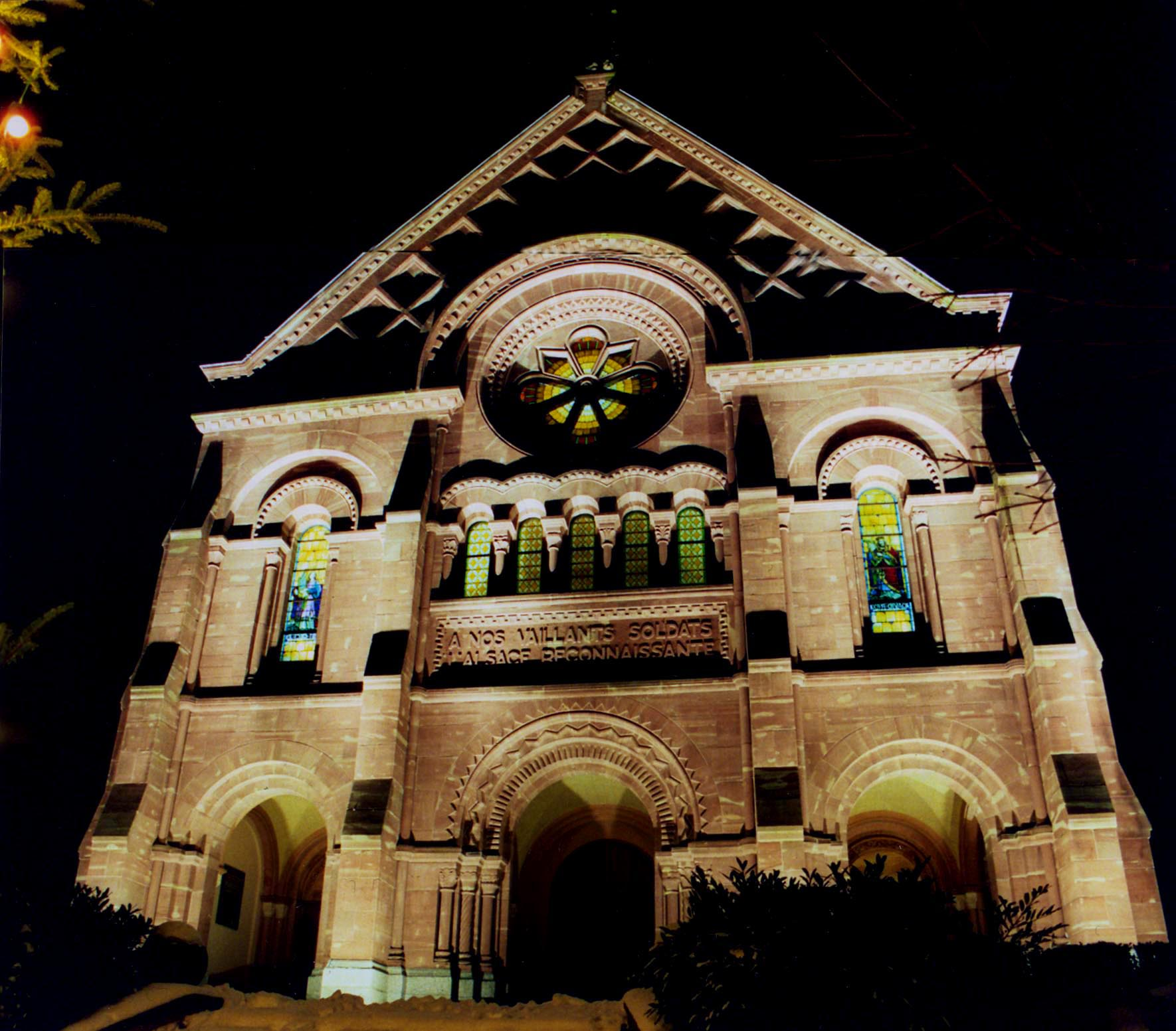 L'église de l'Emm illuminée. Photo : Samuel Wernain (Janvier 2006)